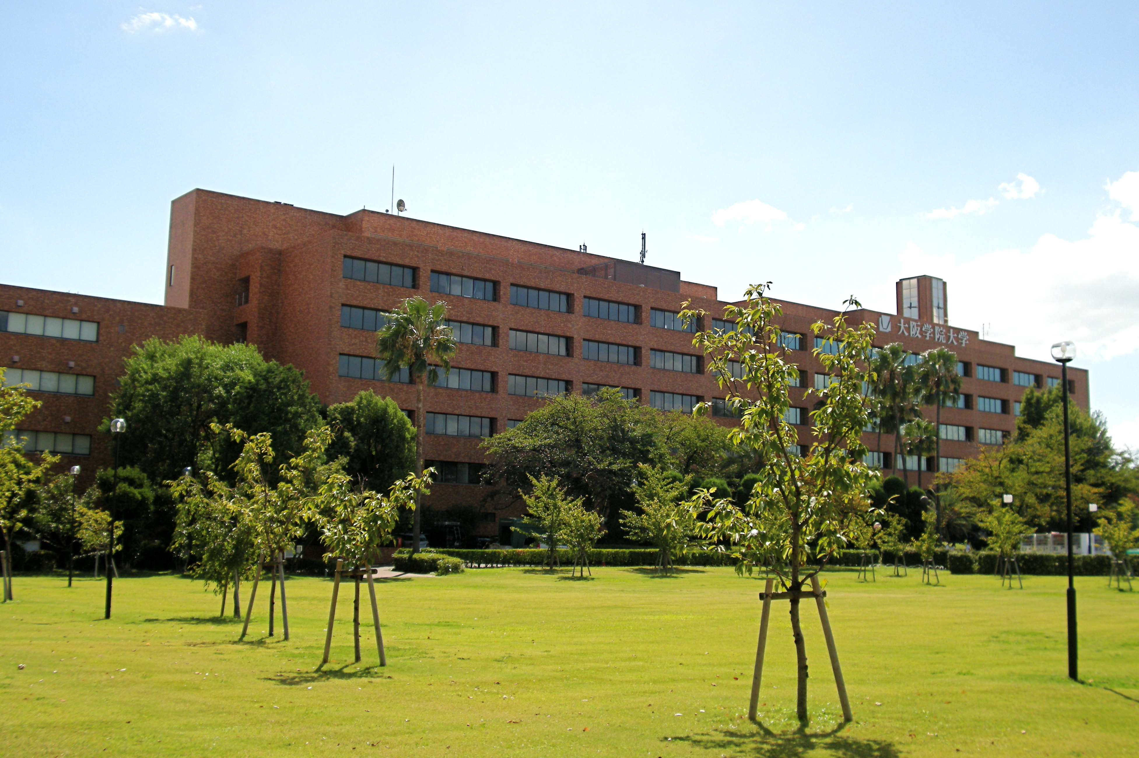 Osaka Gakuin University (Osaka, Japan)